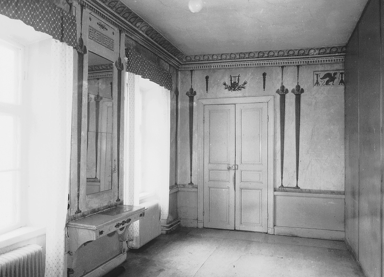 Frösundaviks gård, interiör